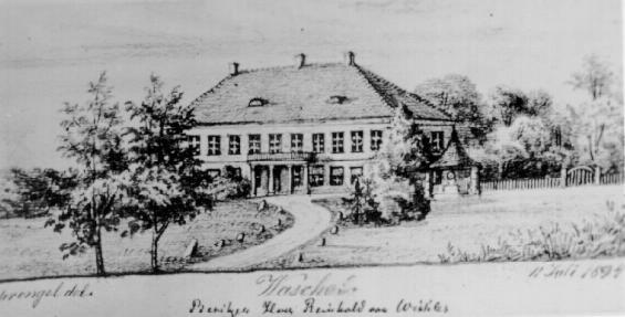 Vasta mõis